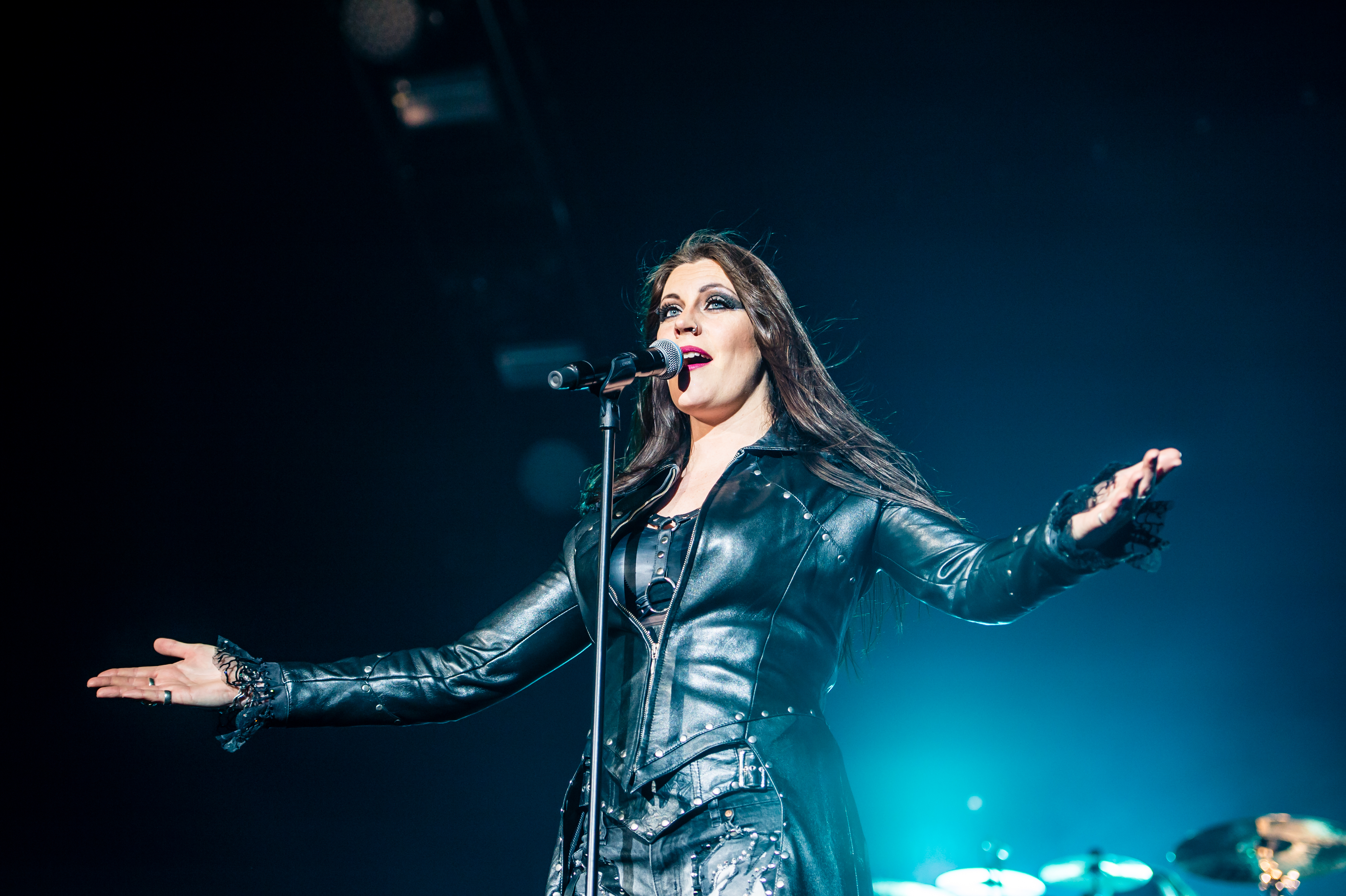 'Nightwish Endless forms most beautiful Tour 2015 Oberhausen'